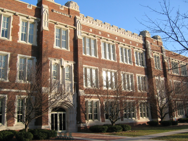 Grinnell College Alumni Recitation Hall